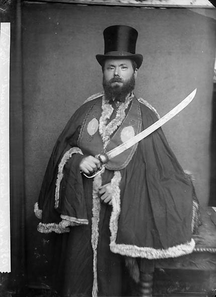 Teitl Cymraeg/Welsh title:Mr Jones, Arglwydd Faer Llansawel Ffotograffydd/Photographer: John Thomas (1838-1905) Dyddiad/Date: [ca. 1885] Cyfrwng/Medium: Negydd gwydr / Glass negative Maint/Dimensions: 16.5 x 12 cm. Cyfeiriad/Reference: jth02407 Rhif cofnod / Record no.: 3363345 Rhagor o wybodaeth am gasgliad John Thomas yn Llyfrgell Genedlaethol Cymru More information about the John Thomas Collection at the National Library of Wales